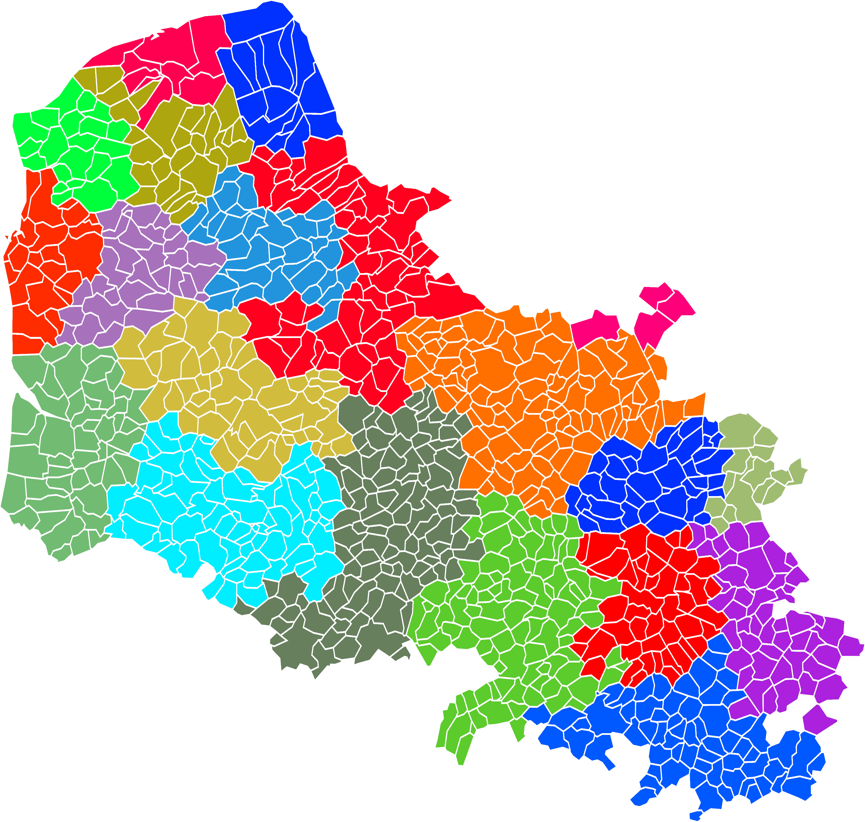 Carte des EPCI du département du Pas-de-Calais, France au 1er janvier 2017.